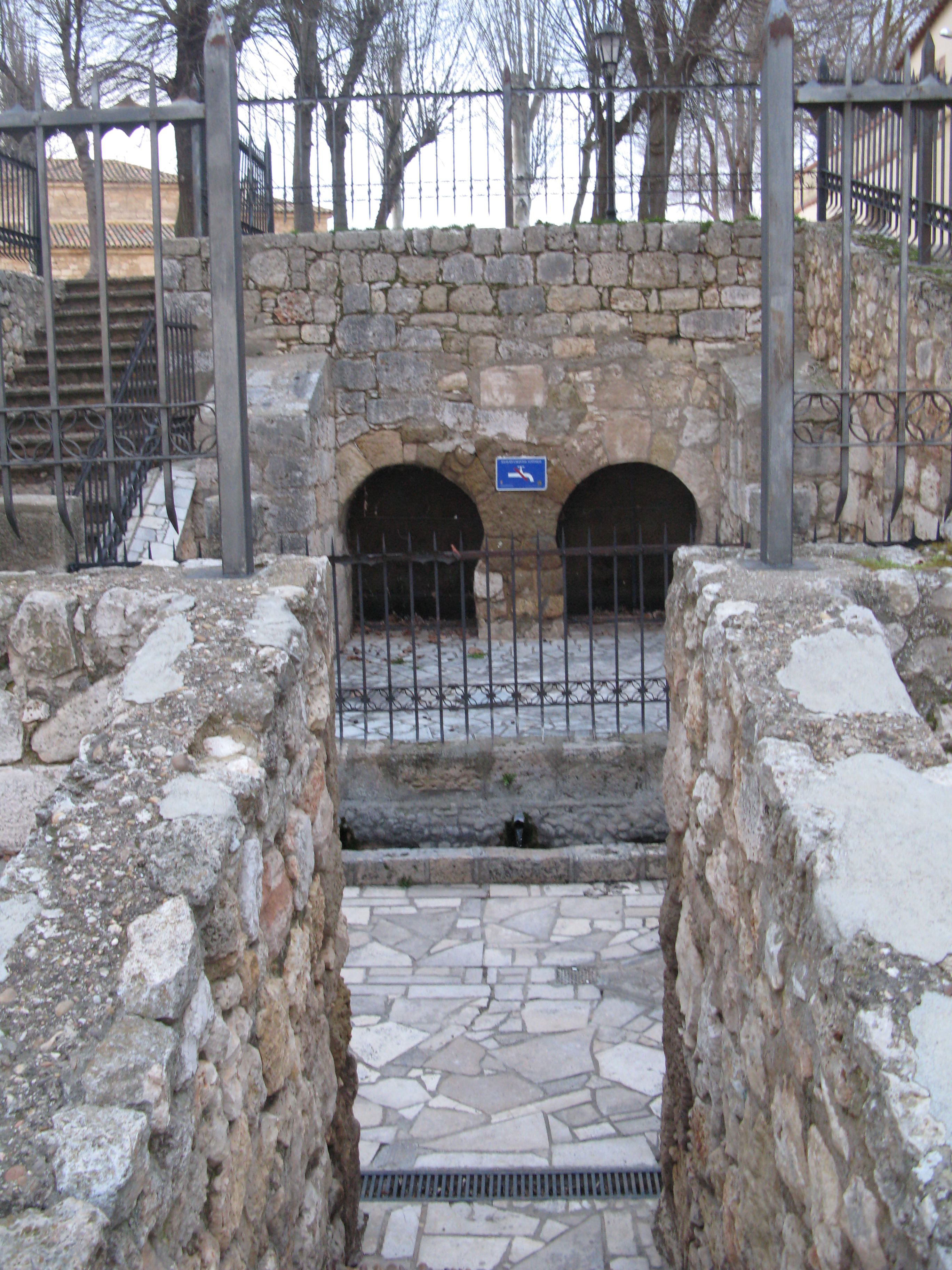 FUENTE DE RECESVINTO O DE SAN JUAN DE BAÑOS